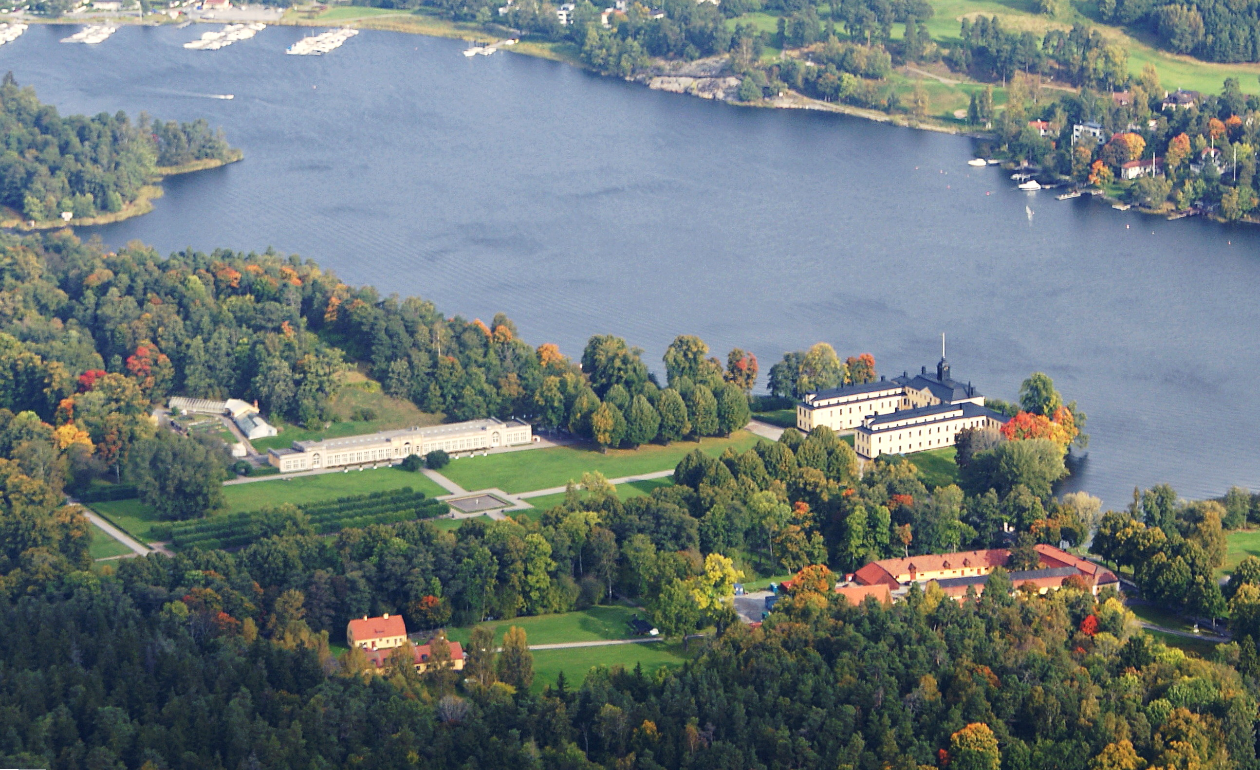 Ulriksdals slott sedd från helikopter.